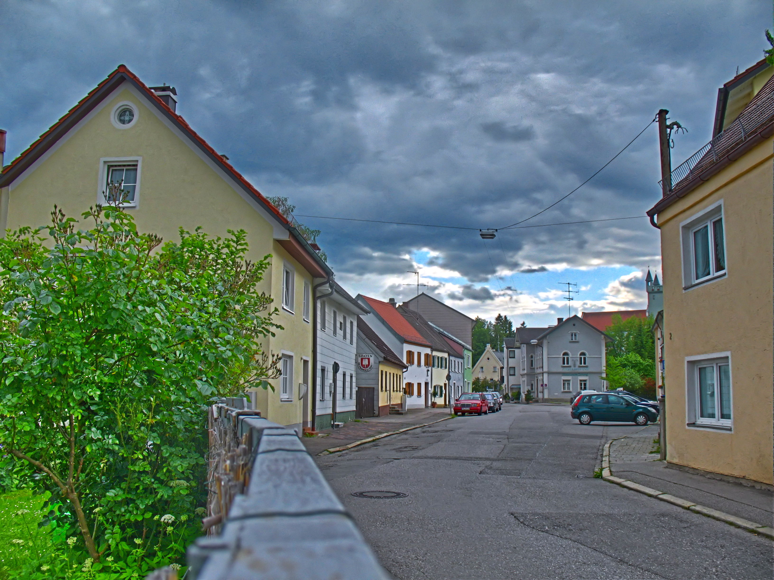 Deutschland, Bayern, Fürstenfeldbruck, Bullachstraße, HDR-Bild